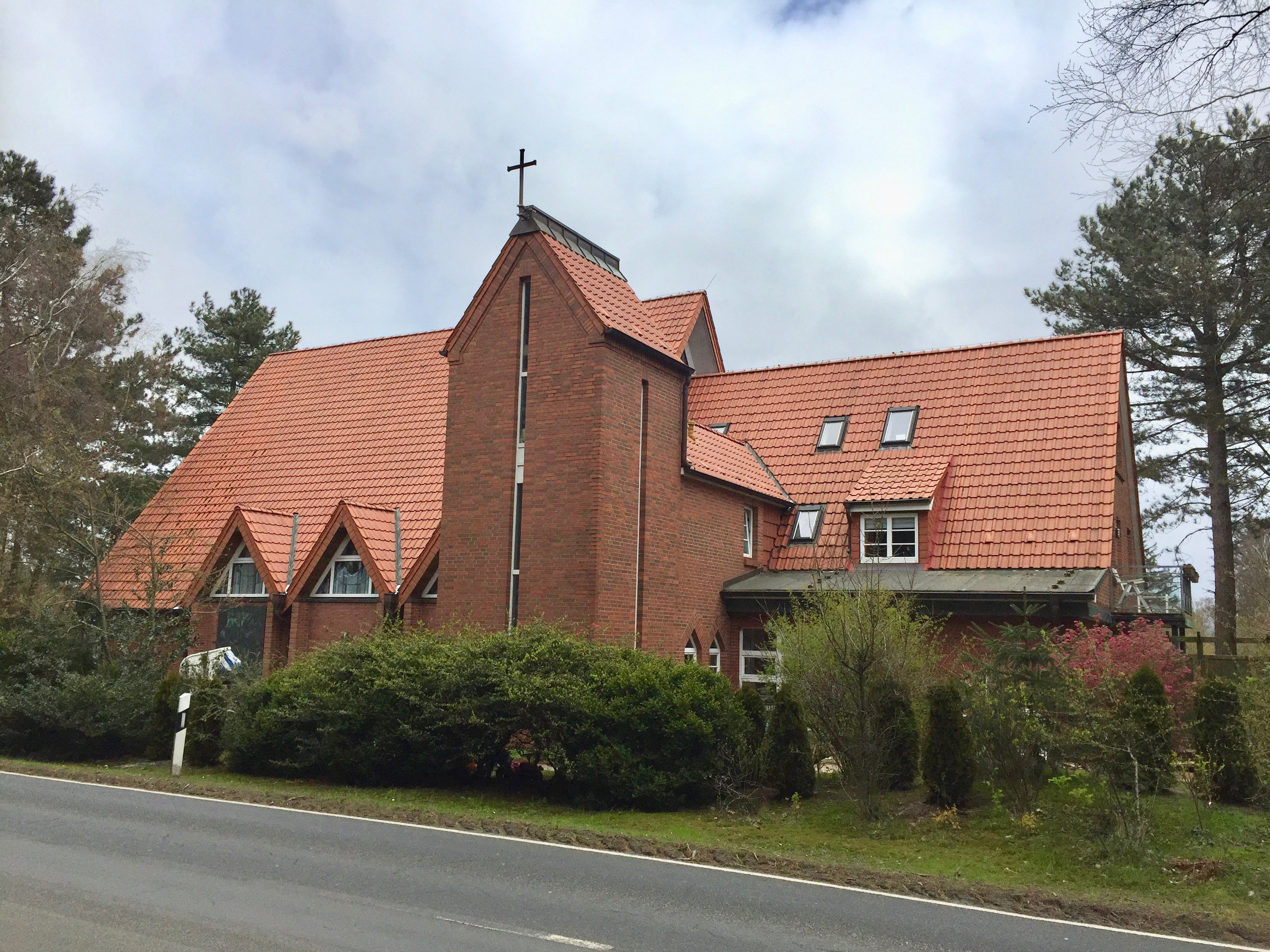 Die Katholische Kirche in Norddorf